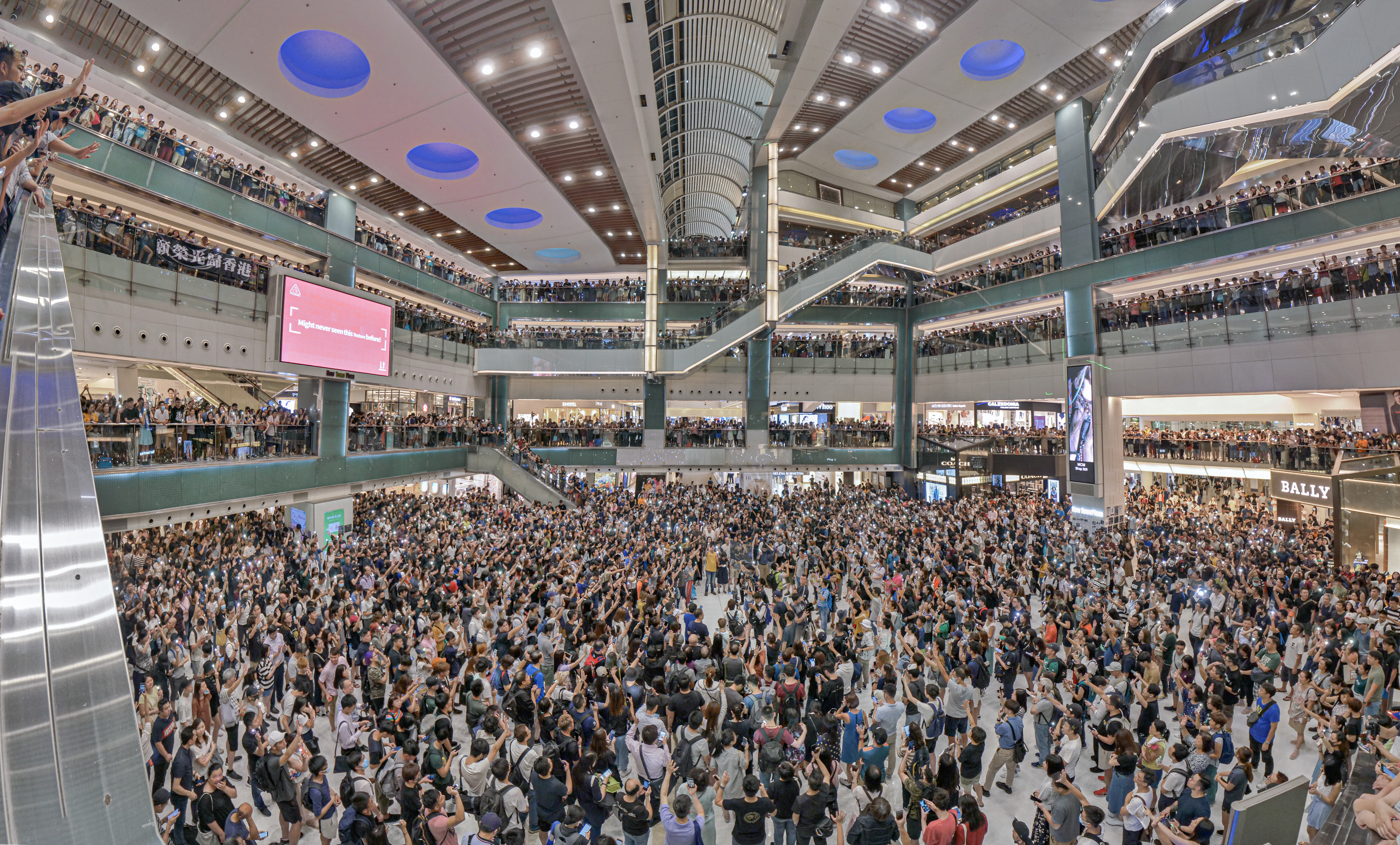 20190911 Shatin